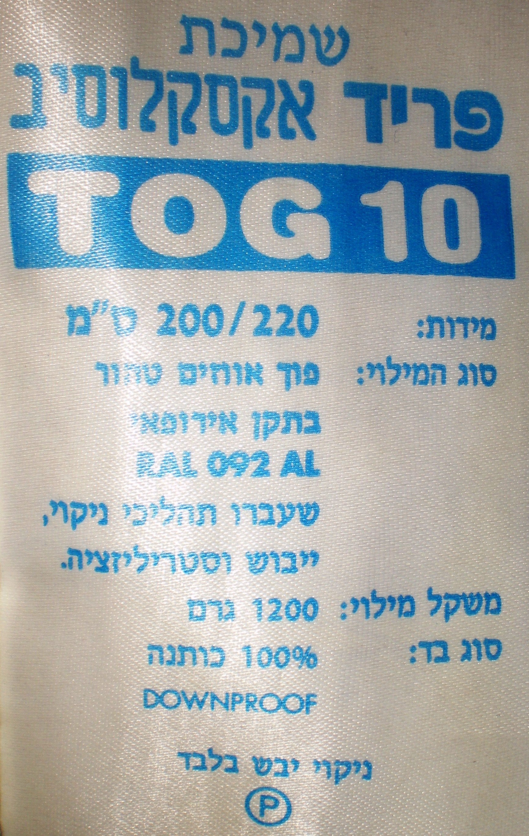 תוית טוג